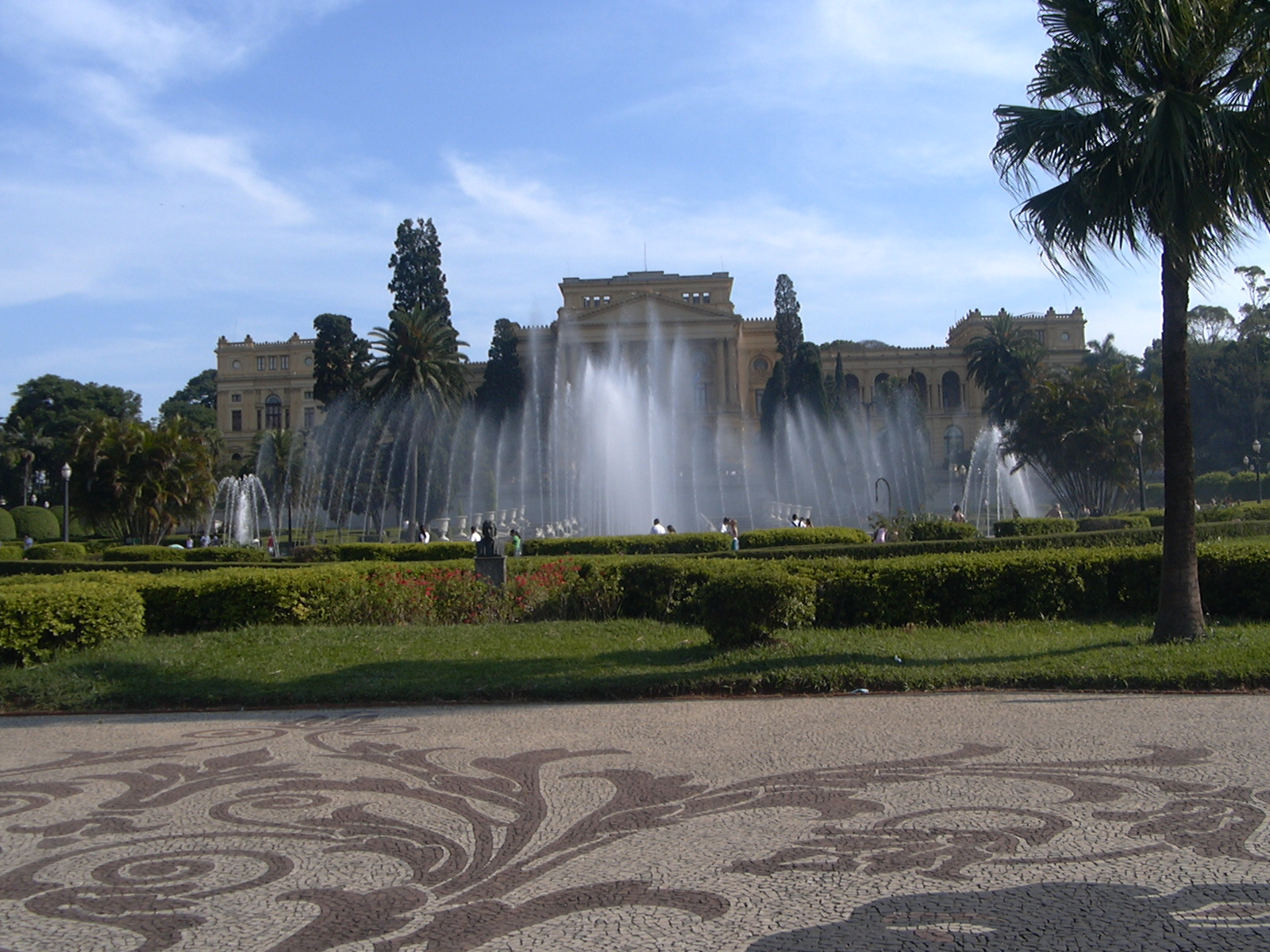 Cultural property Parque da Independência, São Paulo (city), São Paulo (state), Brazil Q2054028, VIAF ID: 3150323802109972194, OSM relation ID: 7346394, P727: iPatrimônio ID: parque-da-independencia, IPHAN ID: 1348, CONDEPHAAT ID: parque-da-independencia-2